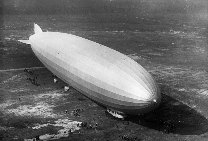 Was Deutschland an Reparationen gleistet hat ! Ein interessanter Ueberblick über die bisher geleisteten Sachlieferungen Deutschlands auf Reparations-Conto. Das auf Reparationsconto erbaute Zeppelinluftschiff "Z.R. III", heute "Los Angeles", welches an Amerika abgeliefert wurde.